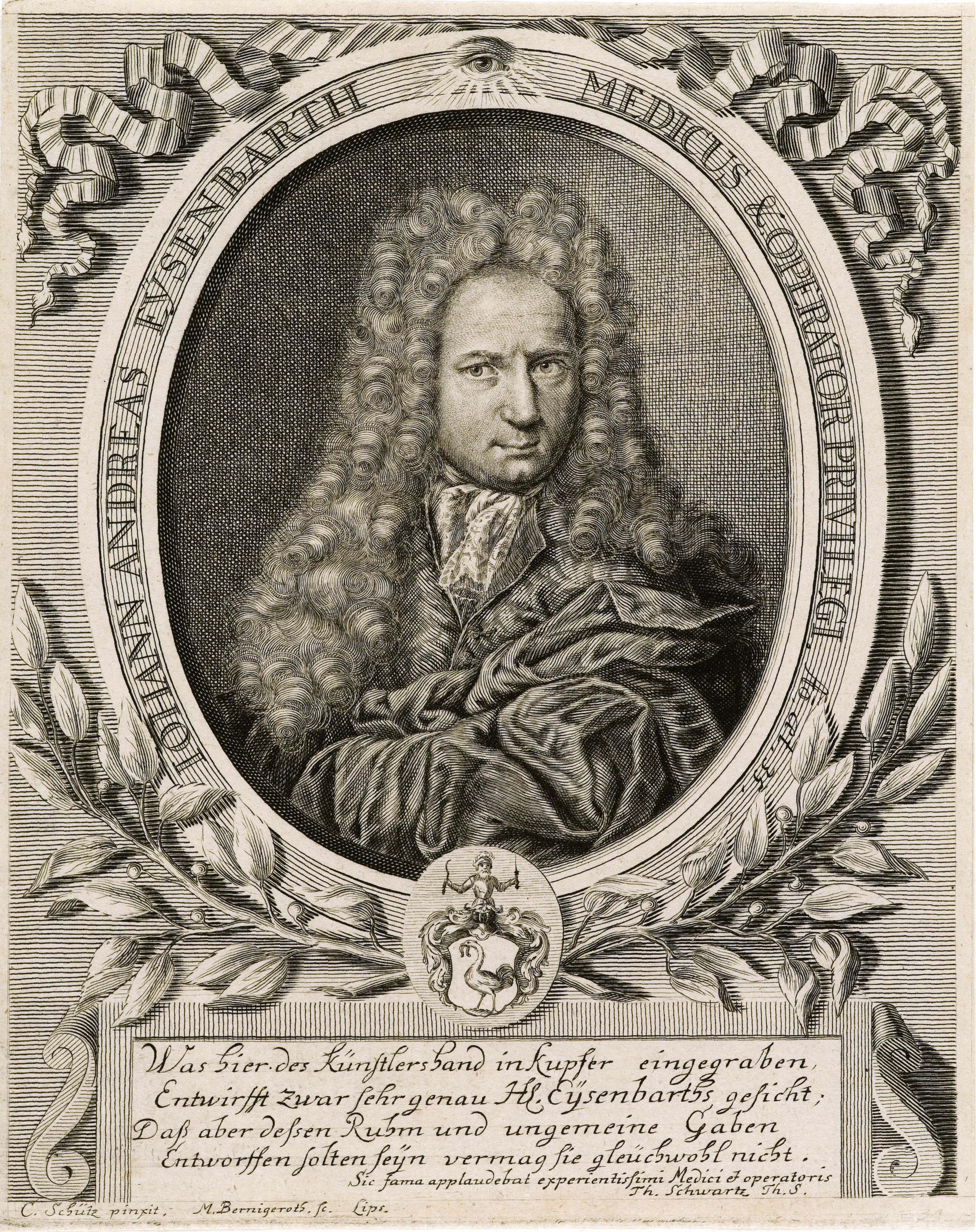 Johann Andreas Eysenbarth